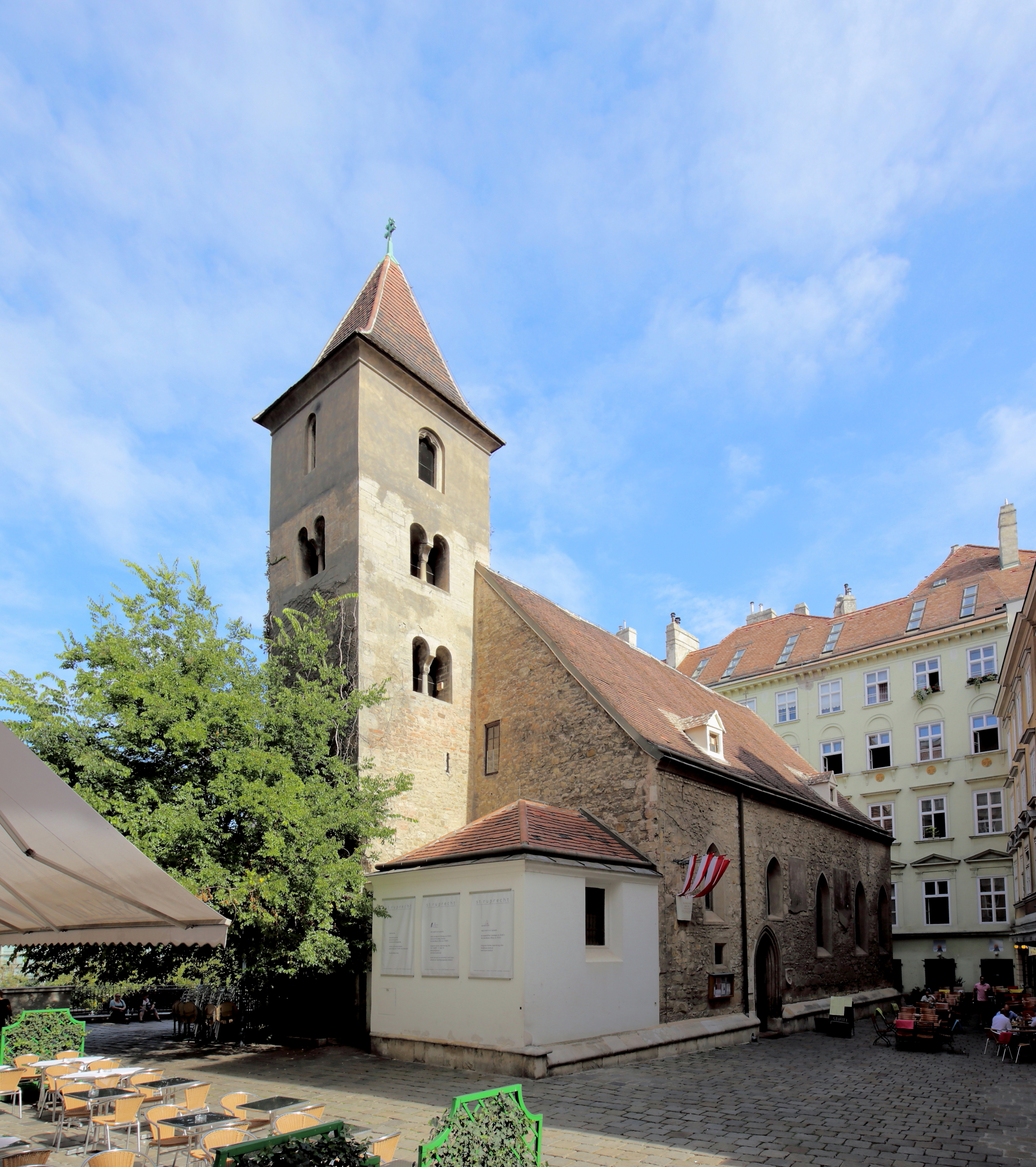 Westansicht der Ruprechtskirche im 1. Wiener Gemeindebezirk Innere Stadt.Die Kirche ist dem Schutzpatron der Salzschiffer heiliger Rupert geweiht und ist die älteste noch bestehende Kirche der Stadt Wien. Das Langhaus und die unteren Geschoße des Turmes stammen weitgehendst aus dem 11/12. Jahrhundert. Sie befindet sich auf dem Gebiet des ehemaligen römischen Militärlagers Vindobona. Nach der Zerstörung der römischen Siedlung entstand die Keimzelle des späteren Wien im Bereich um die Ruprechtskirche. Sie war die Pfarre von Wien, bevor diese Funktion im Jahr 1147 an den Stephansdom überging.